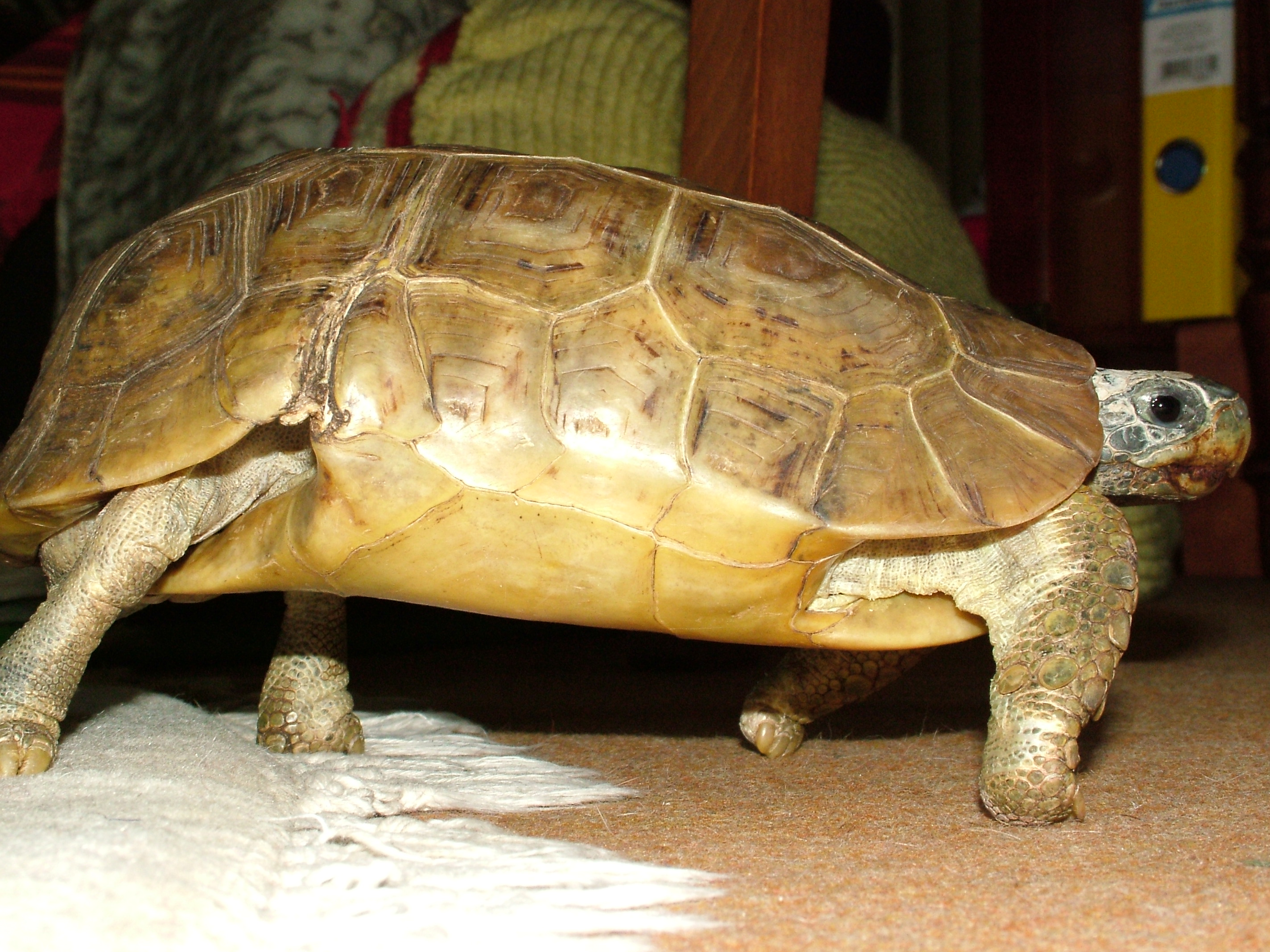 Male adult Kinixys belliana nogueyi